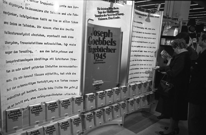 29. Frankfurter Buchmesse Ausstellungsstände